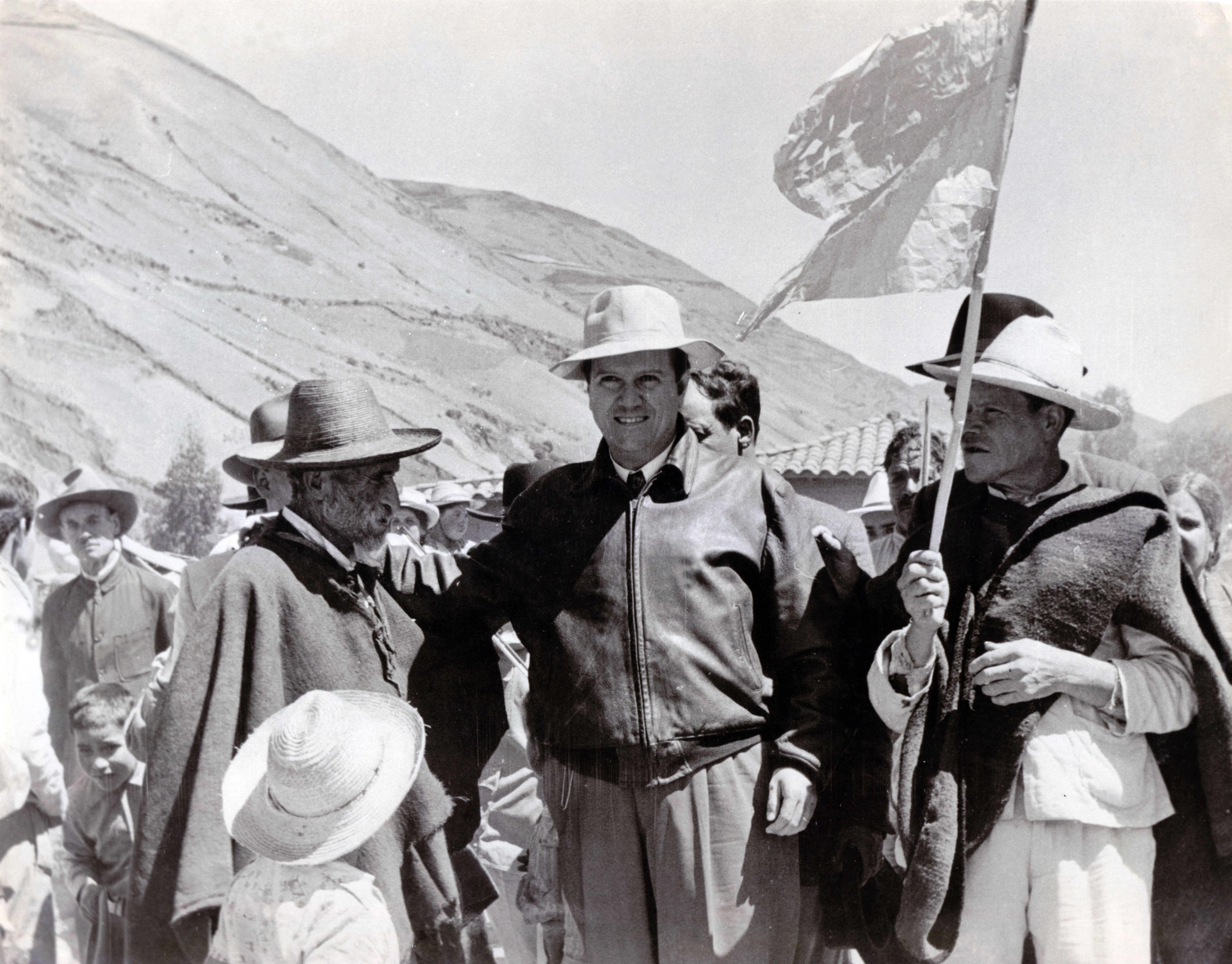 Rafael Caldera en Mucuchíes, páramo merideño, durante la campaña presidencial de 1958.